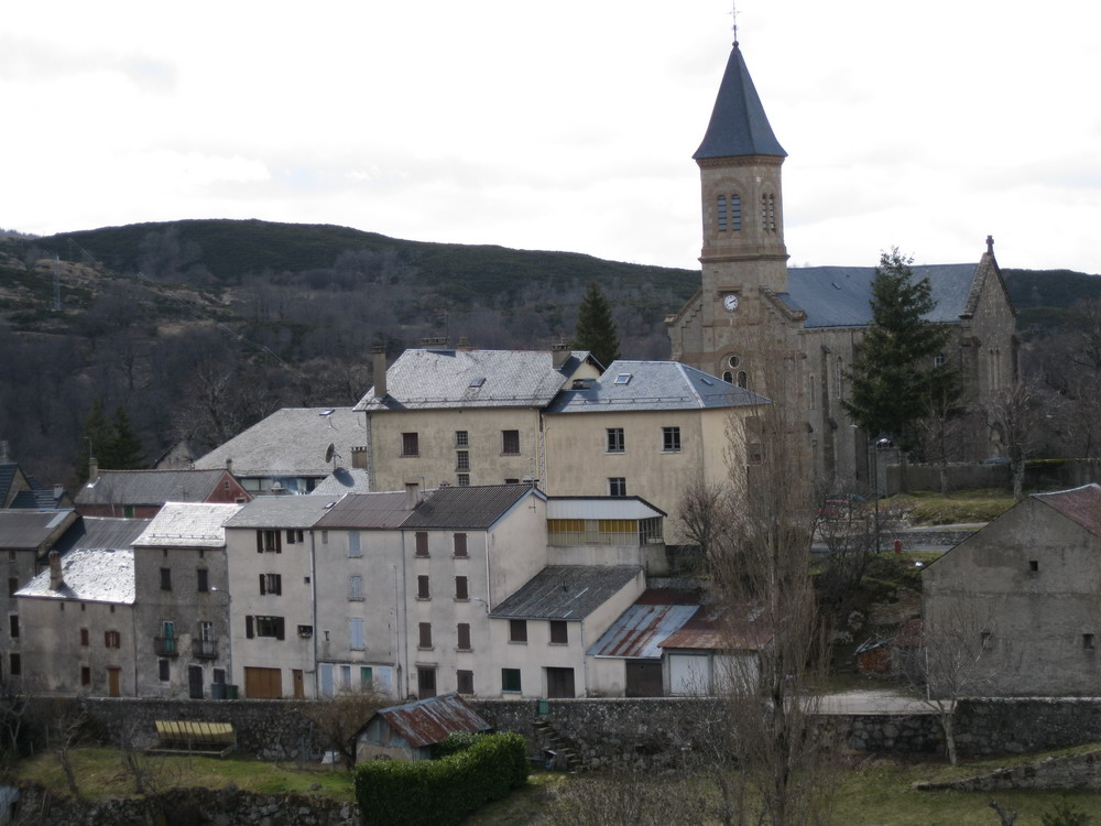 Le village de Dourbies en 2009